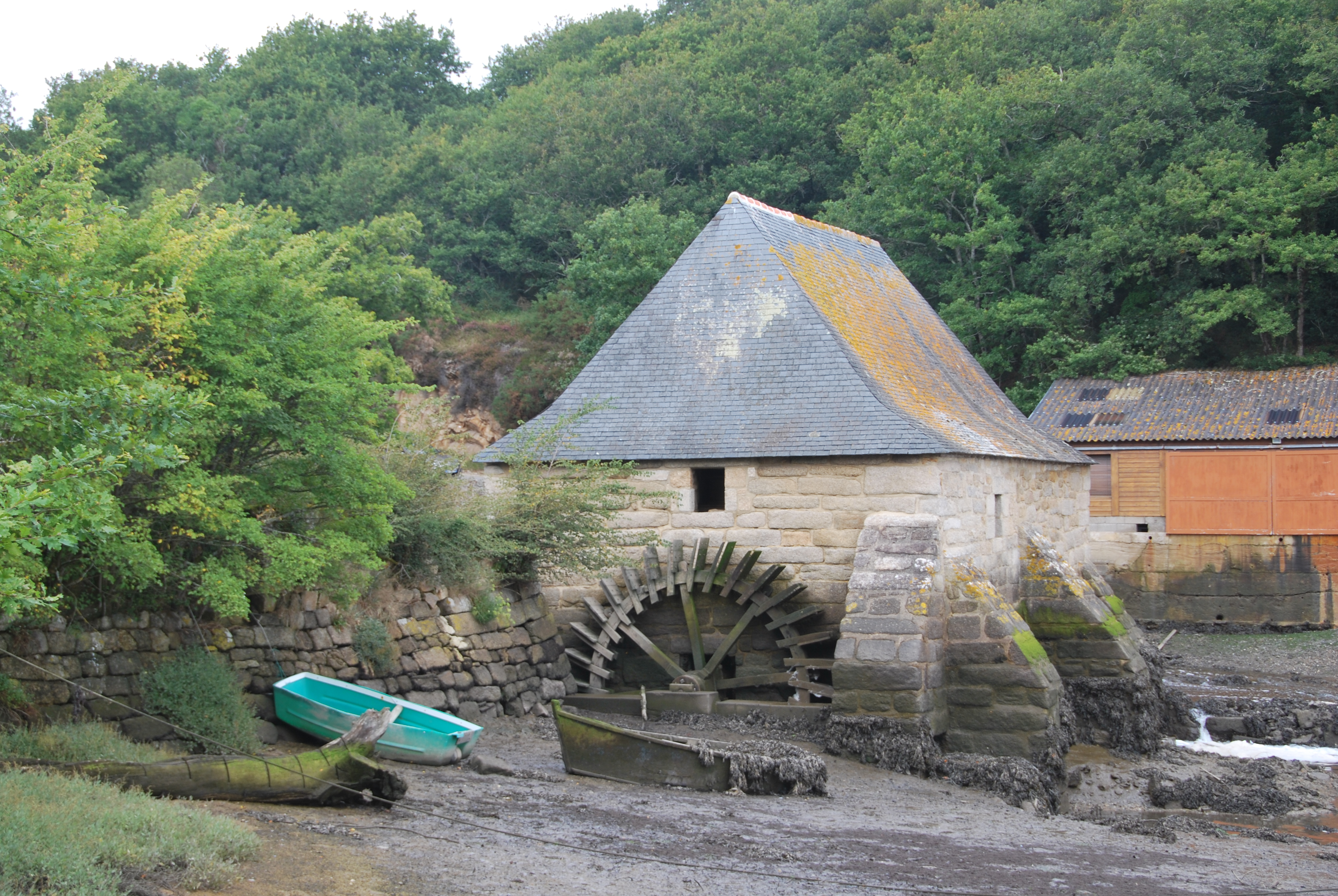 Moulin à marée du Hénan